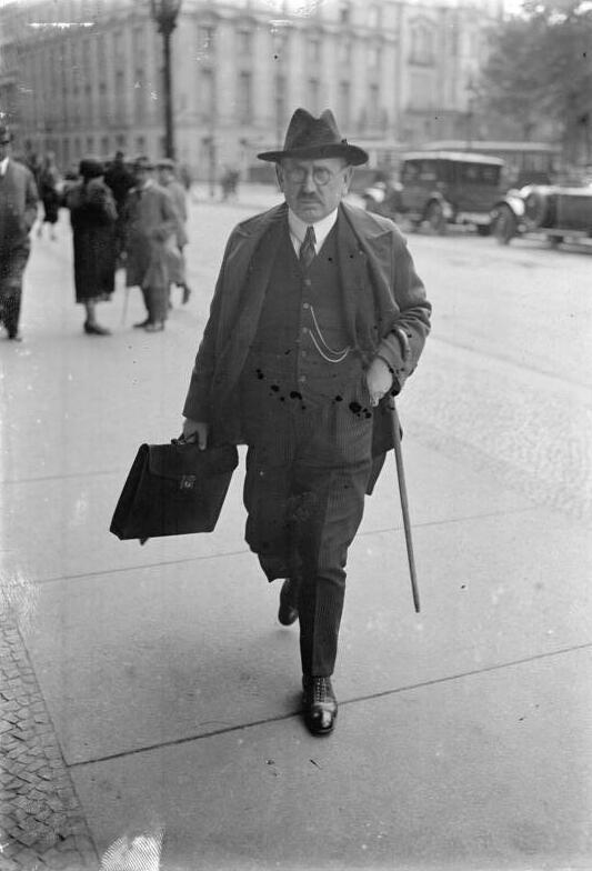 Der deutsche Arbeitsminister nach England eingeladen! Die englische Regierung hat den Reichsarbeitsminister Dr. Stegerwald nach London zu Erörterungen über die Frage der Arbeitszeit im Bergbau eingeladen.